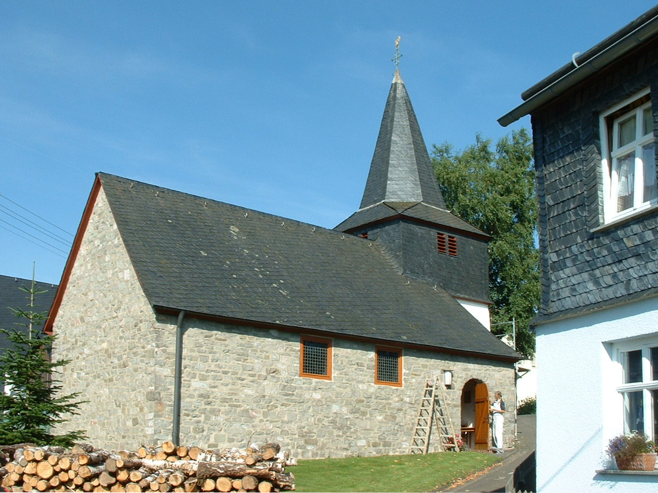 Evangelische Kirche Hochscheid im Hunsrück